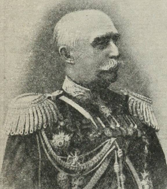 Барон Александр Васильевич Каульбарс. Это изображение было использовано для иллюстрирования статьи «Каульбарсы» опубликованной в двенадцатом томе «Военной энциклопедии», который был издан книгоиздательским товариществом И. Д. Сытина в 1913 году в столице Российской империи городе Санкт-Петербурге. Более подробное описание к этой картинке можно прочесть в указанной выше статье.